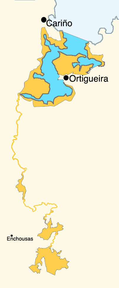 Mapa do lugar de importancia comunitaria de Ortigueira - Mera. Licensing {